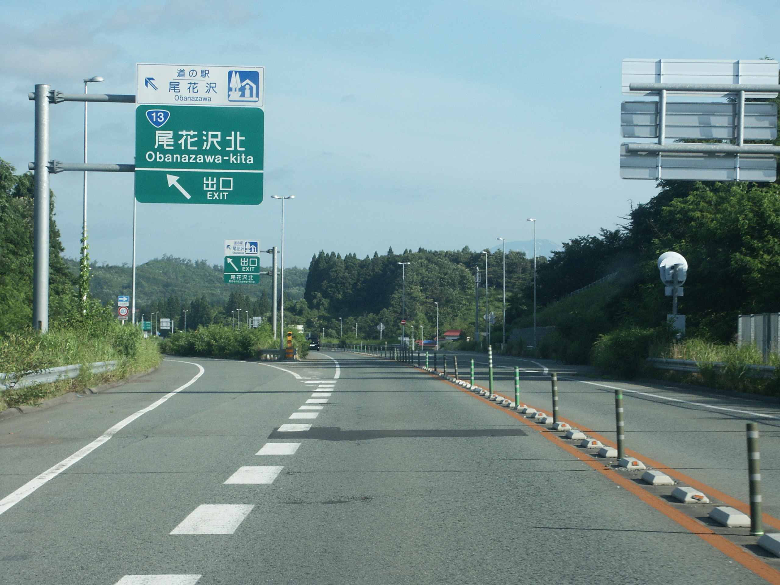 東北中央自動車道（尾花沢新庄道路）尾花沢北IC出口（尾花沢IC方面側）